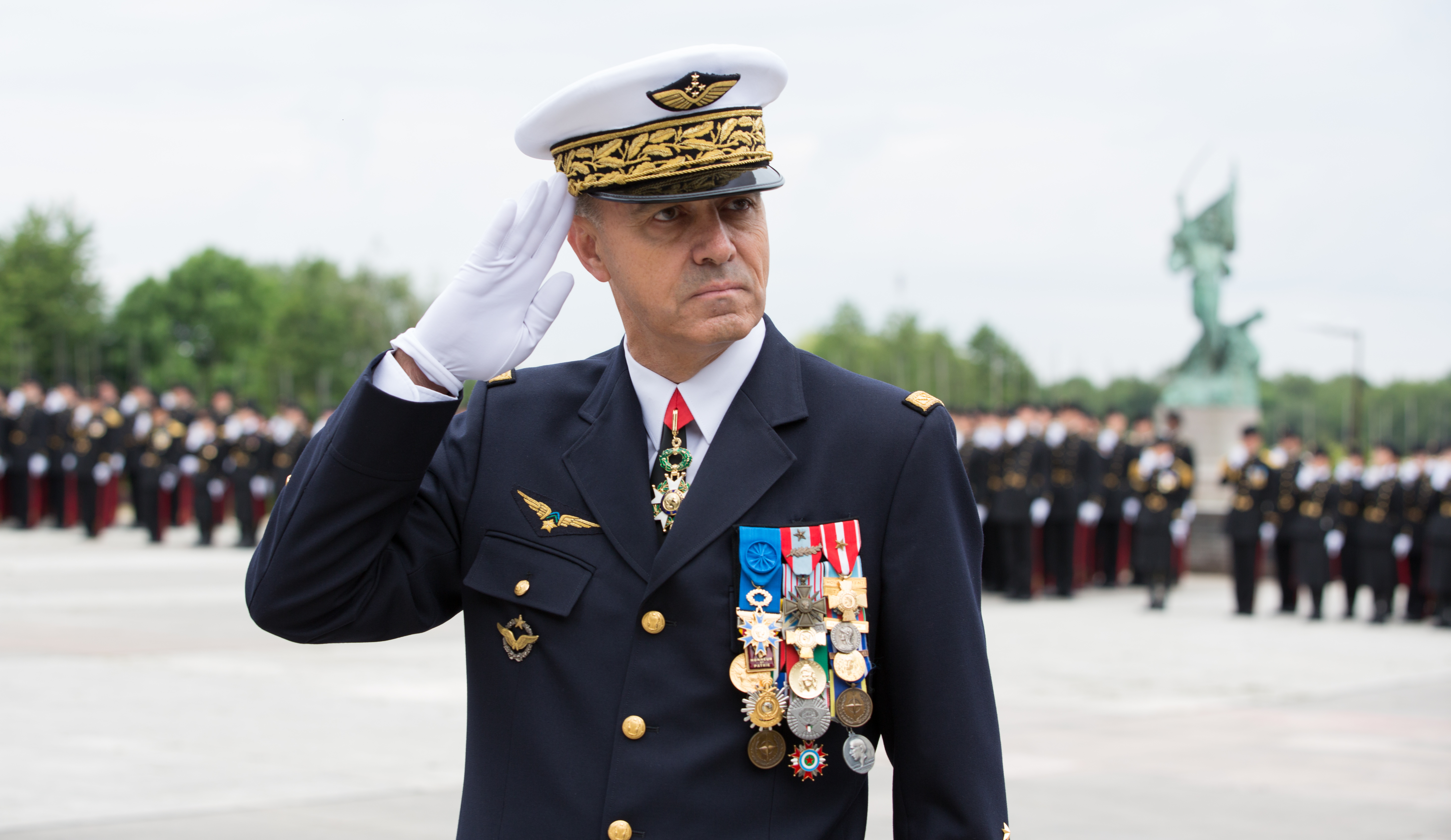 Le général d'armée aérienne André Lanata, chef d'état-major de l'armée de l'air , en 2016.